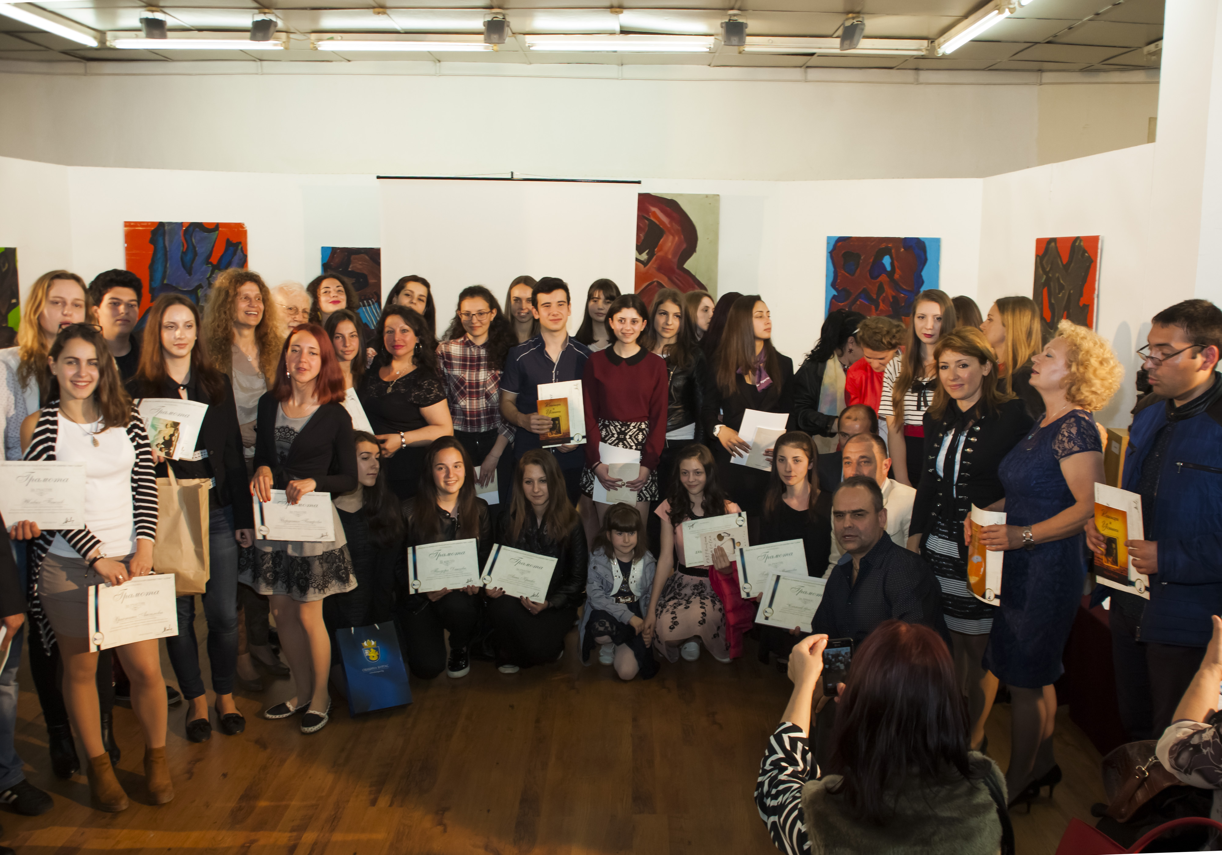 "Алеф" създава национален ученически литературен конкурс